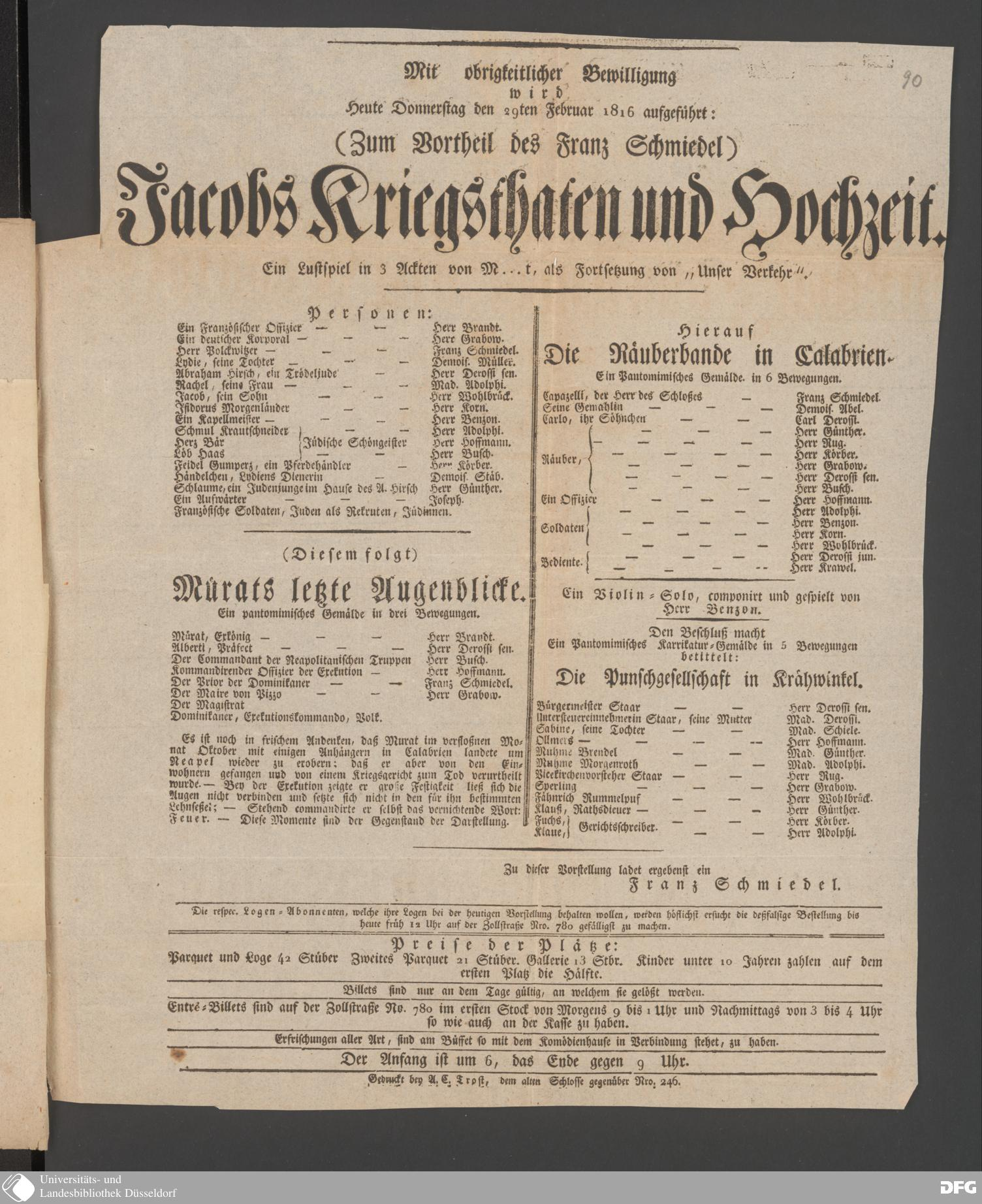 Karl Borromäus Alexander Sessa Jakobs Kriegsthaten und Hochzeit. Theaterzettel Düsseldorf 1816. Unter den Schauspielern Josef Derossi. Angekündigt ist außerdem die Pantomime Murats letzte Augenblicke über den 1815 standrechtlich erschossenen Joachim Murat, zwei weitere Pantomimen und ein Violinspiel des Komponisten Siegfried Benzon (1793-1825). Der Ort Altes Theater (Düsseldorf)??? ist unklar.